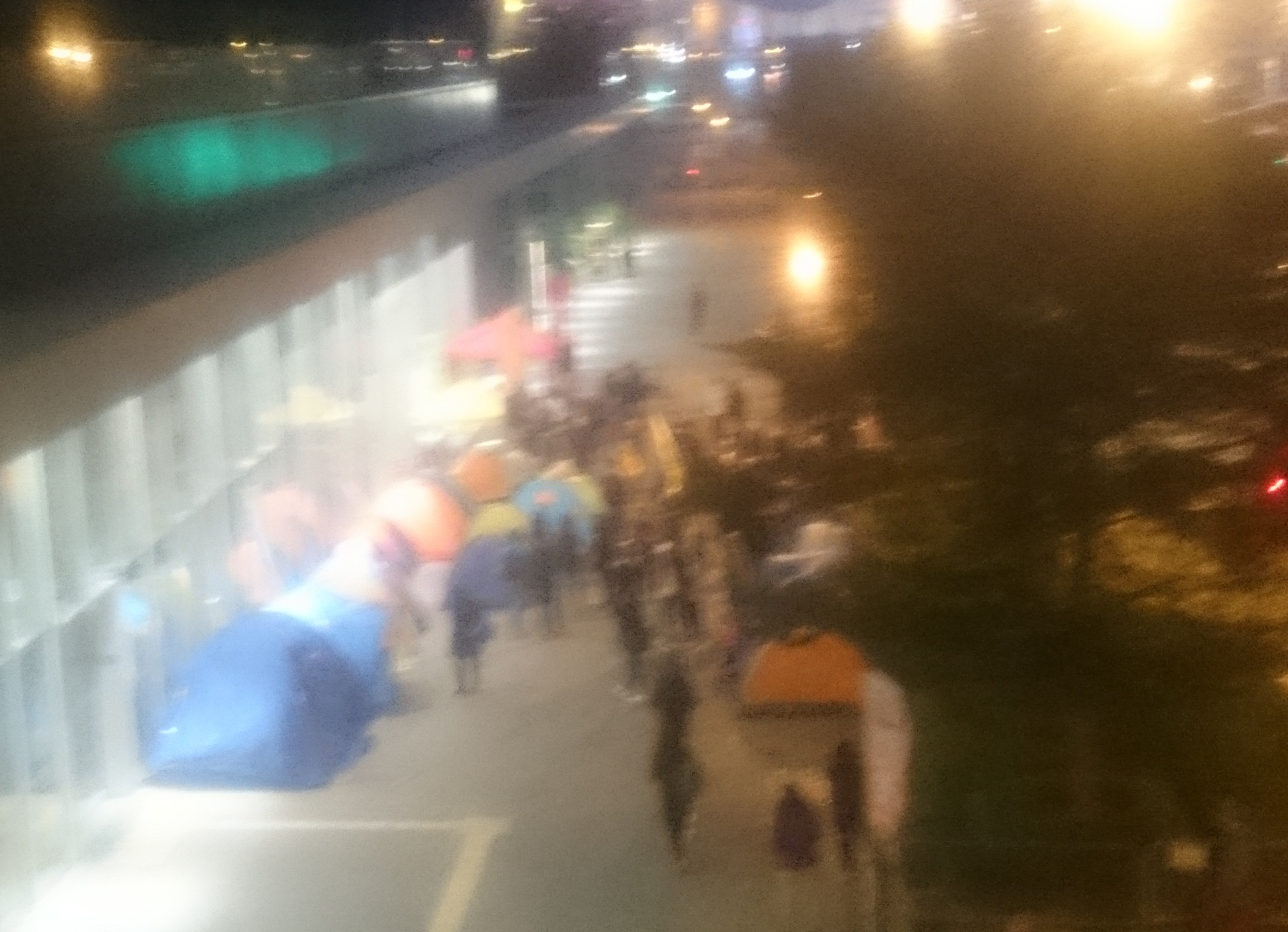 粵語: 2017年12月12號，立灋會出面有反修改議事規則集會。